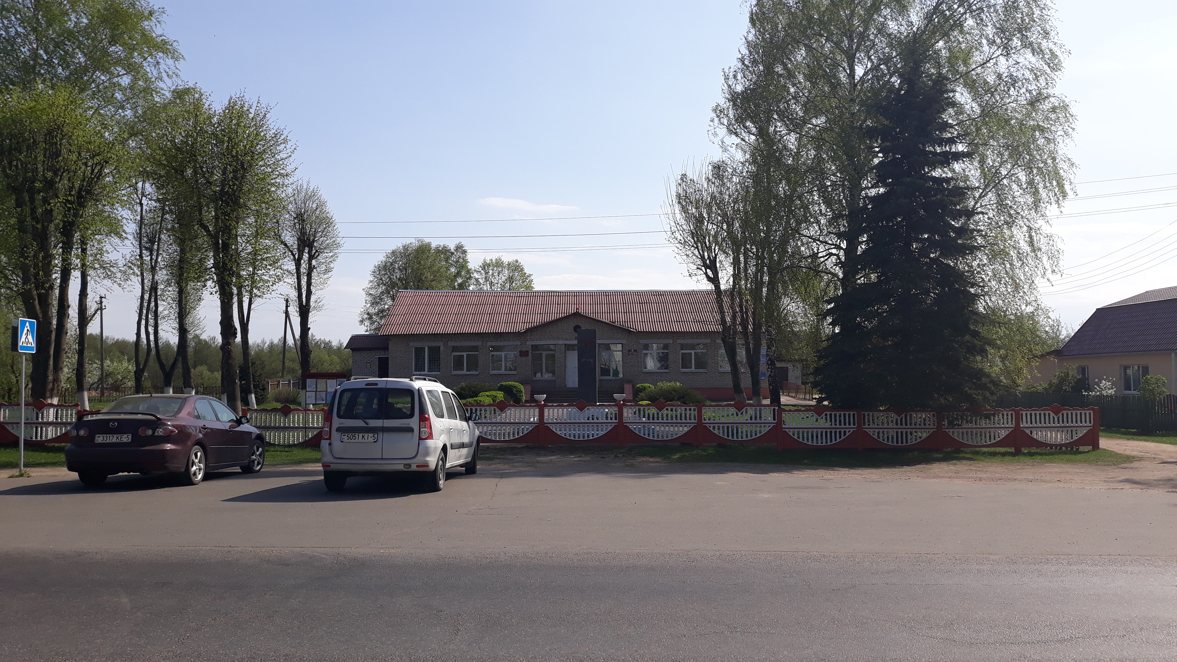 Навапольскі сельсавет